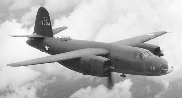 Martin B-26B Marauder (s/n 41-17704).